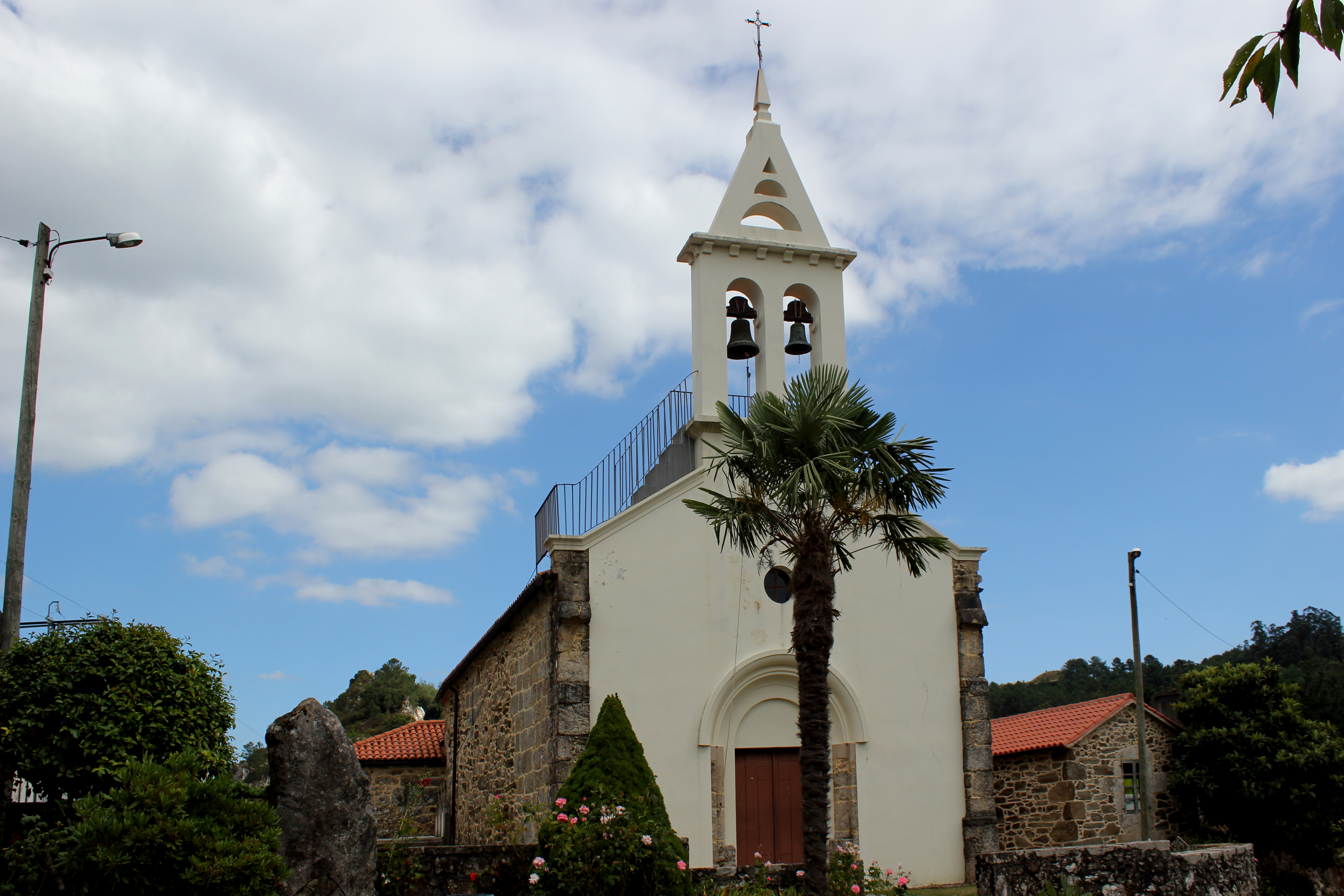 Igrexa de San Miguel de Castro, A Estrada.